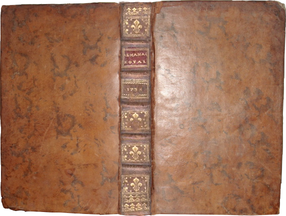 Almanach royal de 1738, exemple de reliure classique faite par l'imprimeur